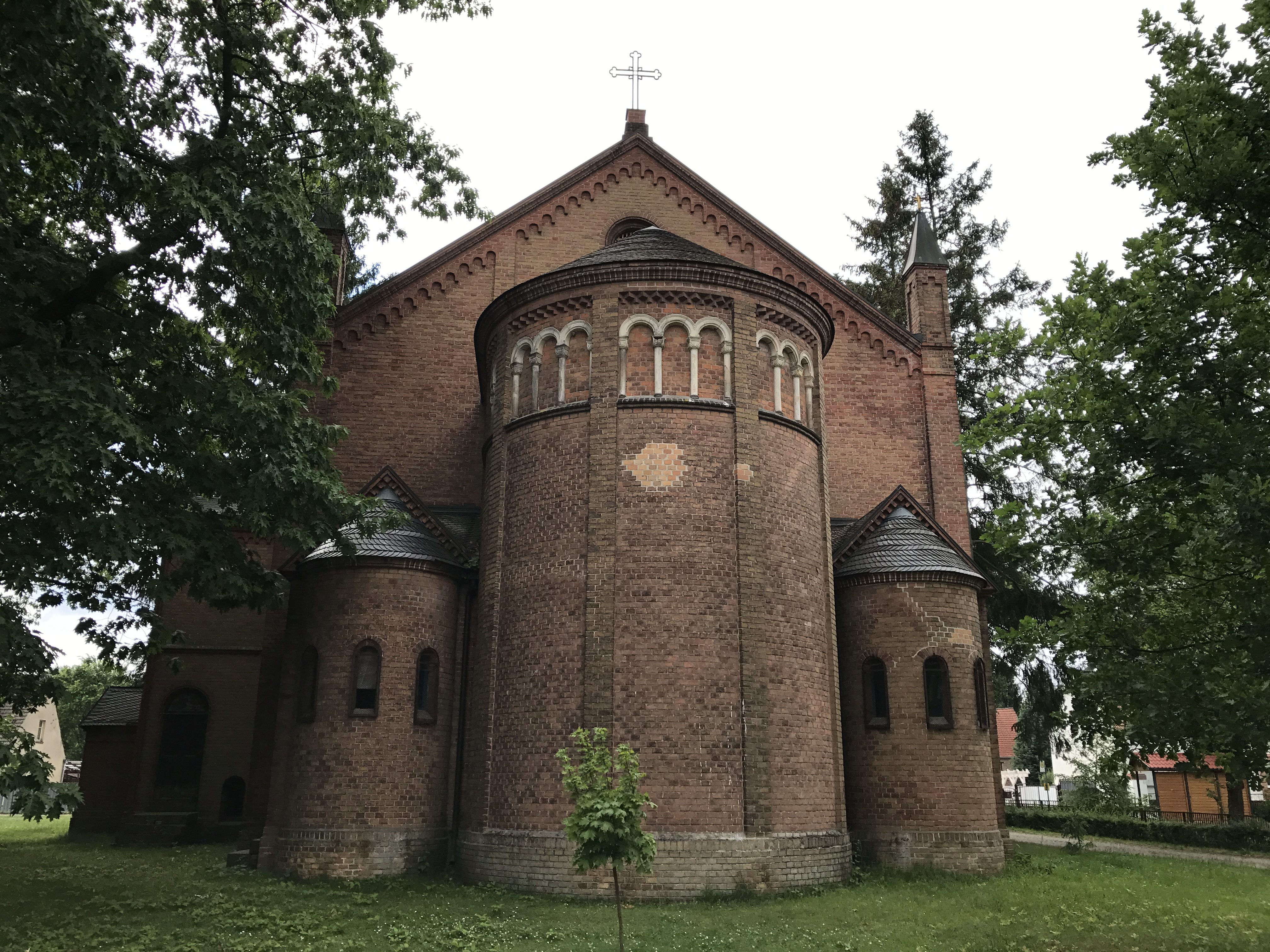 Die Dorfkirche in Selchow ist ein neuromanischer Bau, der in den Jahren 1865 und 1866 nach Friedrich August Stüler erbaut wurde. In dem Bauwerk in Storkow (Mark) befindet sich unter anderem ein Triptychon der Künstlerin Renate Niethammer.